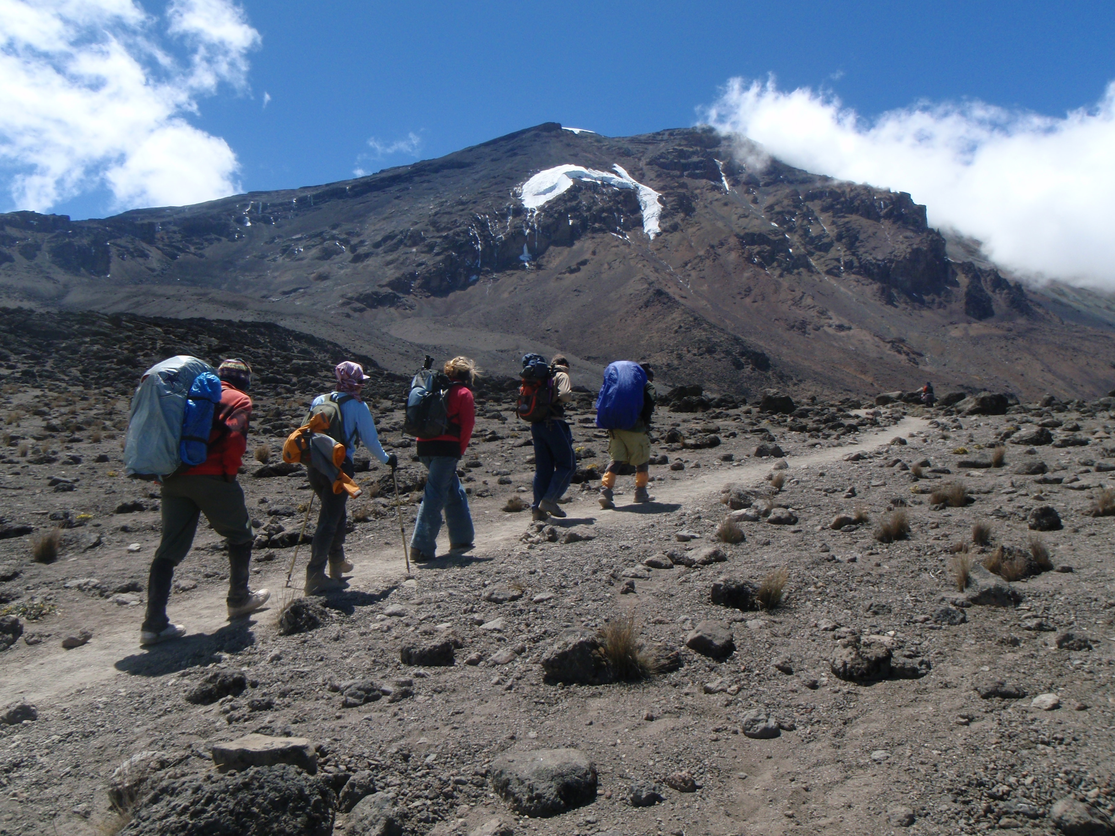 キリマンジャロのラヴァタワー麓へ向かう登山者。高度4,000～4,600m。